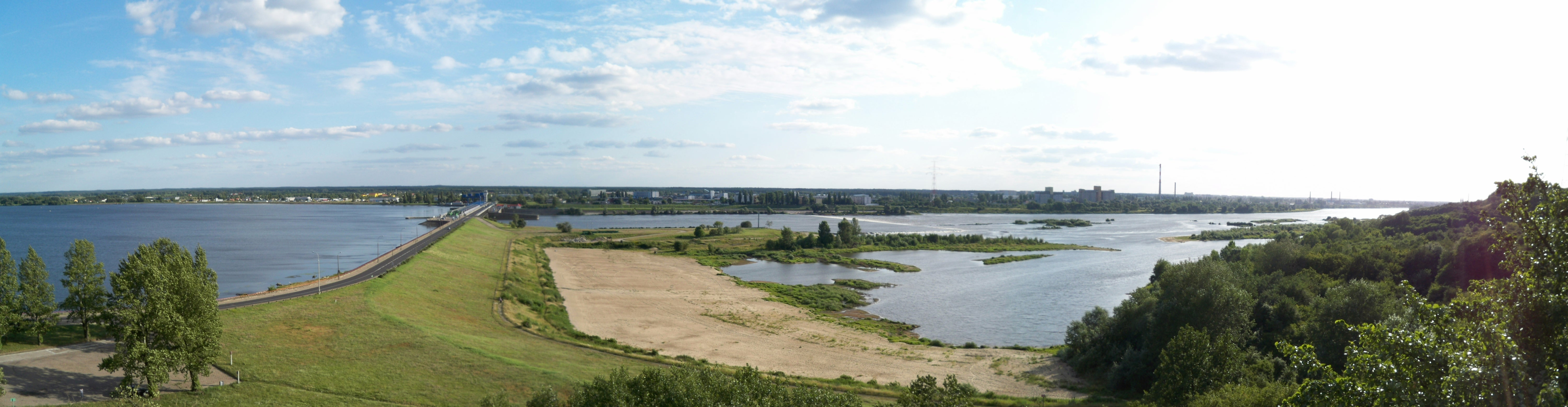 Widok tamy we Włocławku ze skarpy wiślanej